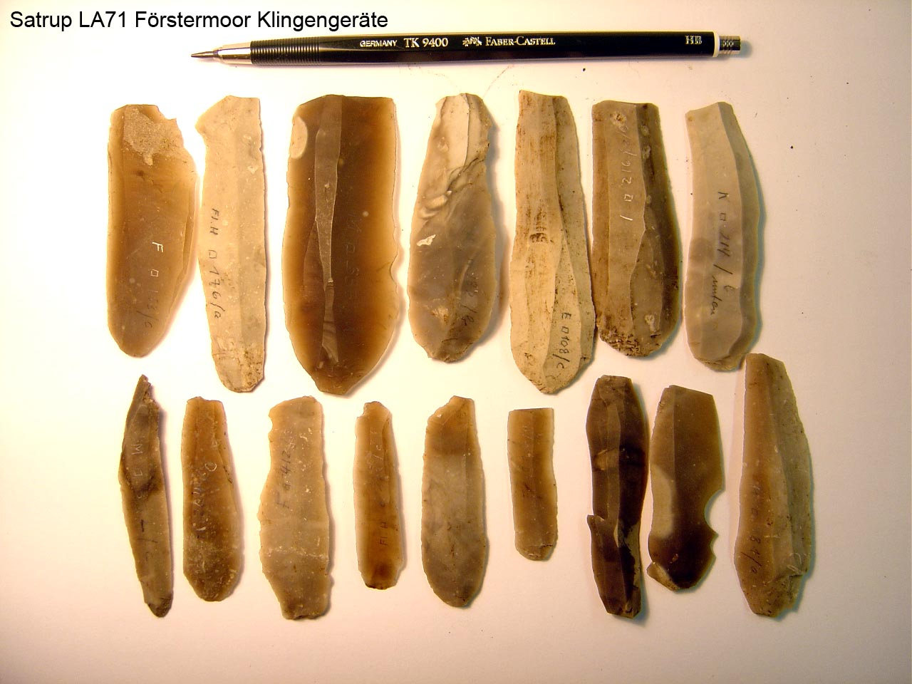 Auswahl Klingengeräte Satrup LA 70